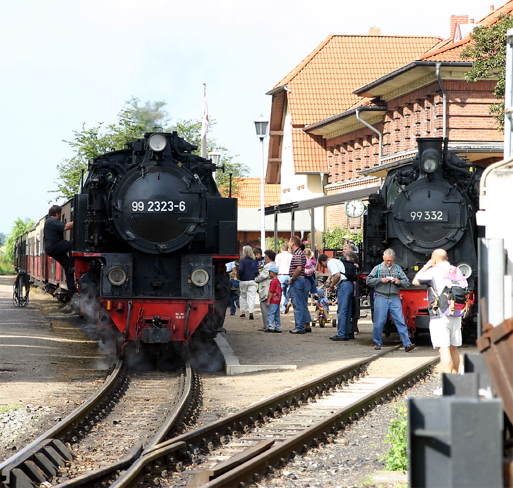 Die Dampflokomotiven der Baureihe 99 der Deutsche Reichsbahn im Bahnhof Kühlungsborn West.